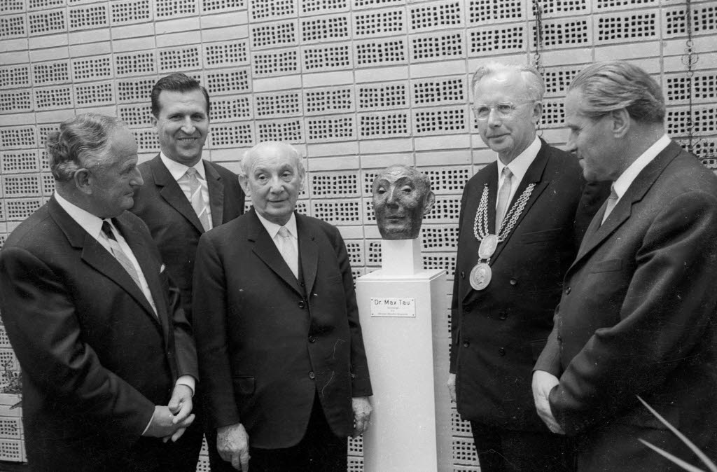 Enthüllung der Büste, einer Kopie der vom Bildhauer Kurt Lehmann für die Max-Tau-Schule gefertigten Büste. V. l.: Stadtschulrat Kurt Max Hoffmann, Oberbürgermeister Günther Bantzer, Max Tau, Universitätsrektor Prof. Wolf Herre, Stadtpräsident Hermann Köster. Max Tau ist seit 1964 Ehrenbürger der CAU.